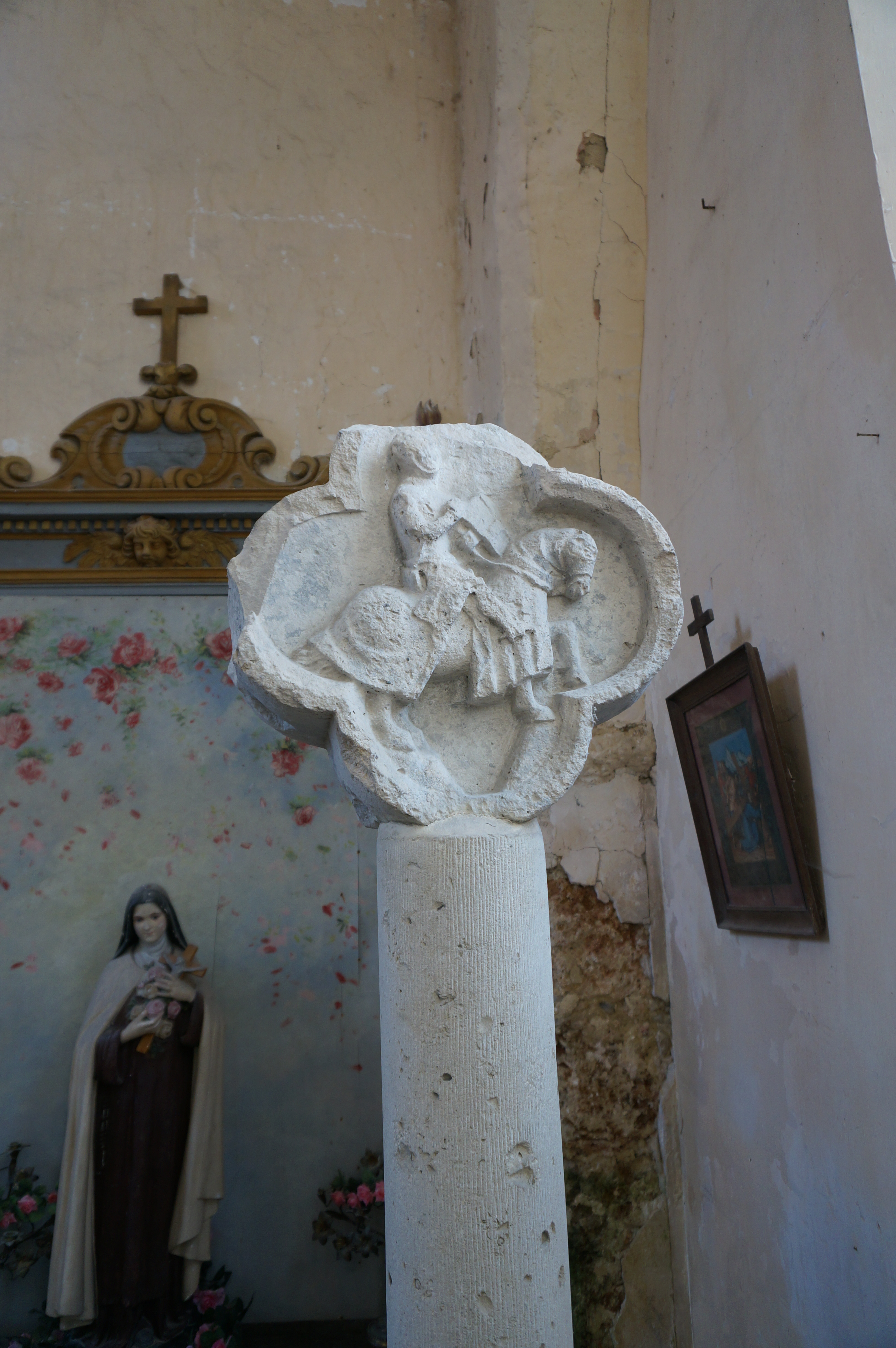 à Connigis.